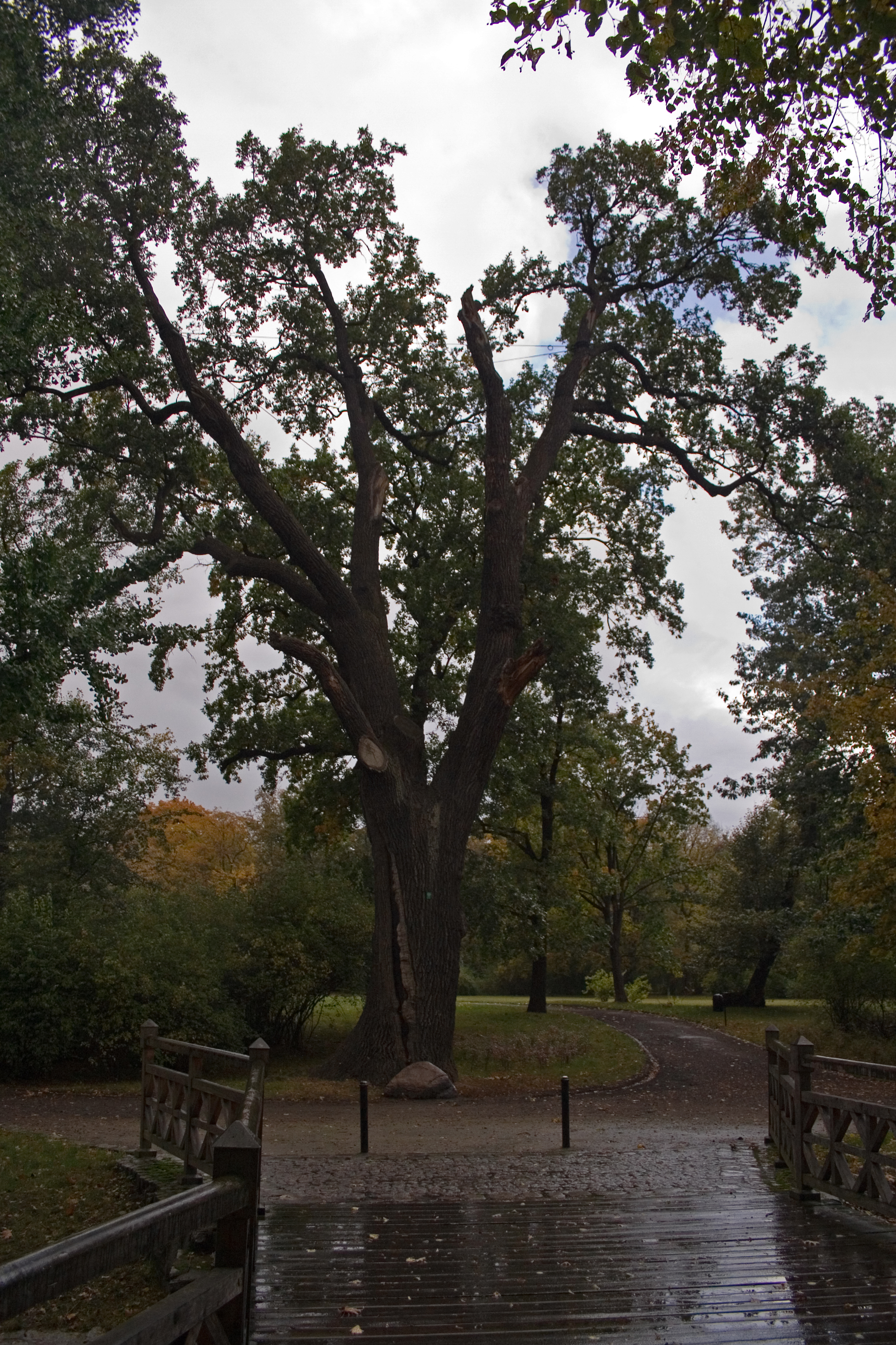 Dąb Jana Stanki we Wrocławiu